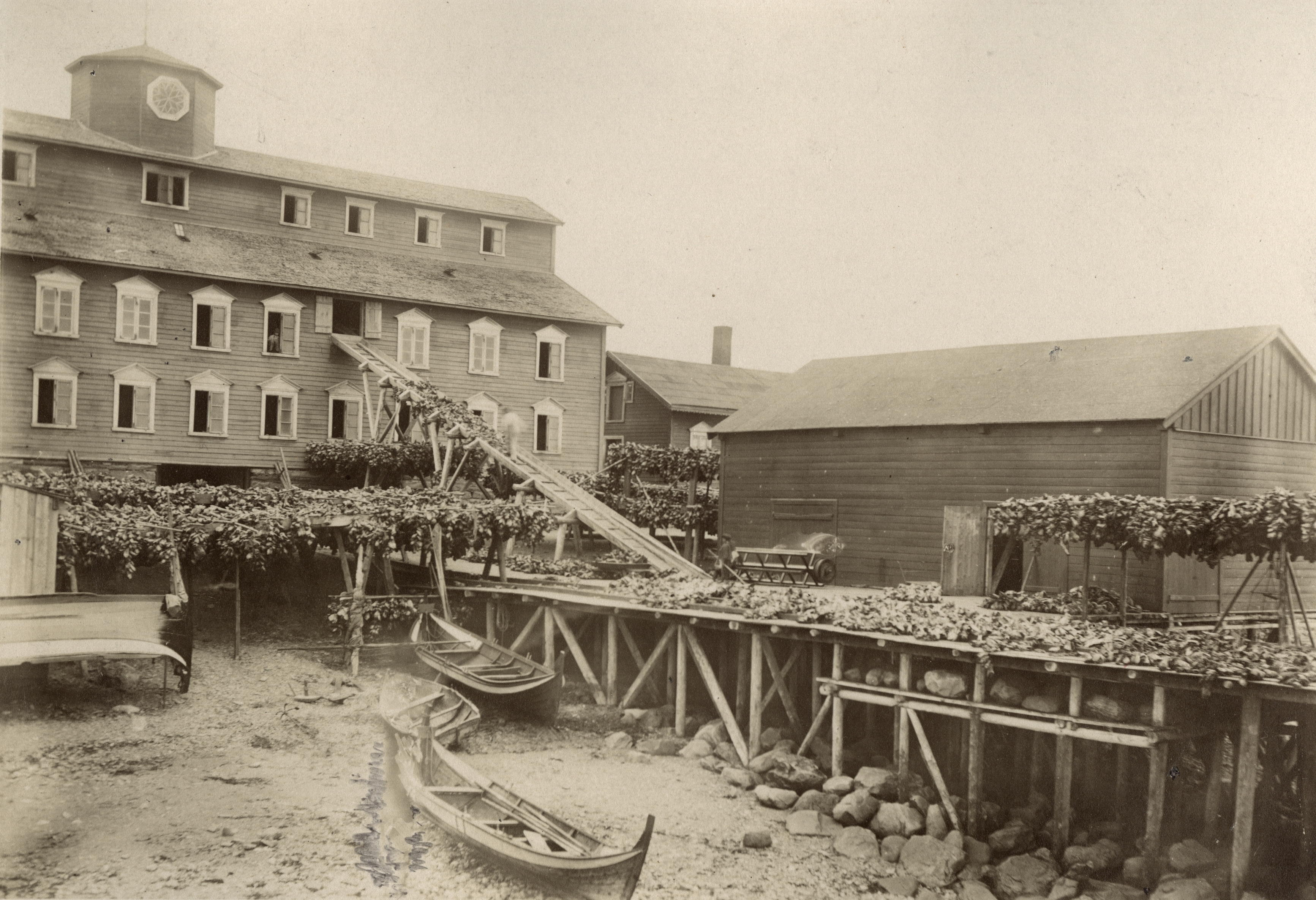 Vadsø i Vadsø, Finnmark No. 10. Usine de guano près de Vadsö, têtes de morues. This image on crowdsourcing geotagging platform Fotodugnad